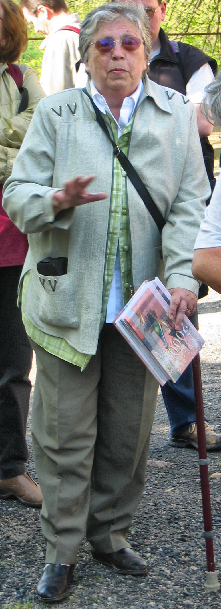 Frau Jutta Barthel, Leiterin des Museums Mutzschen am 1.5.2004